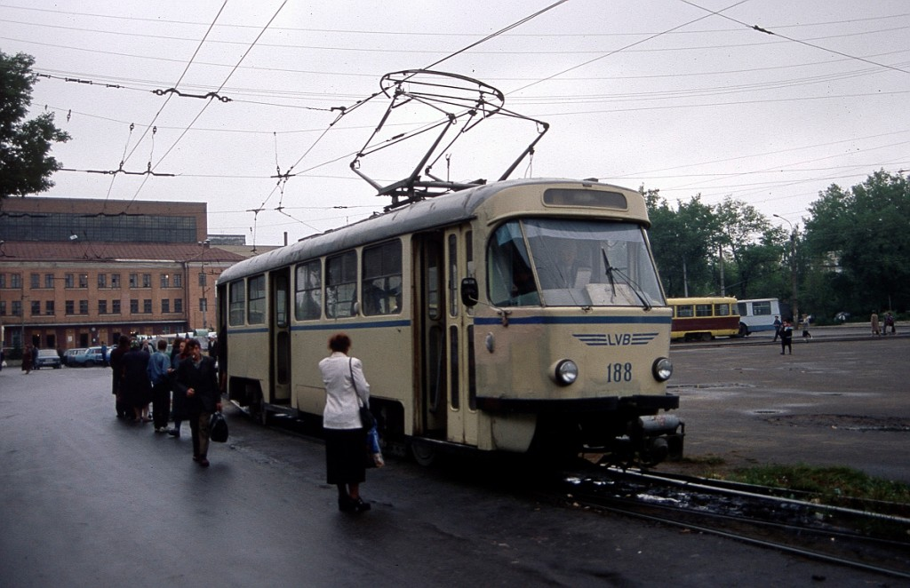 Трамвай на кольце Циолковского